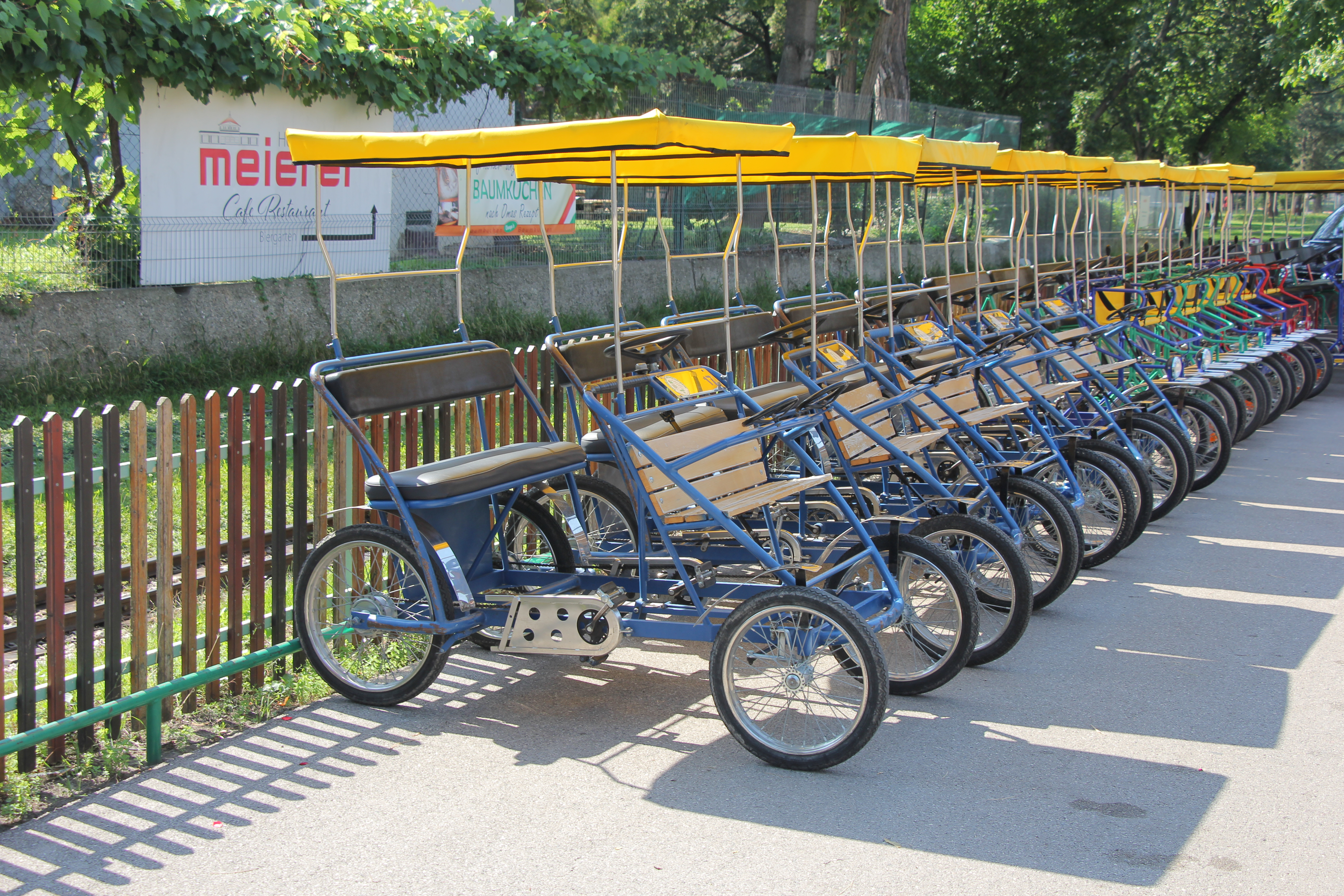 Tretmobil (Rikscha) verleih im Wiener Prater